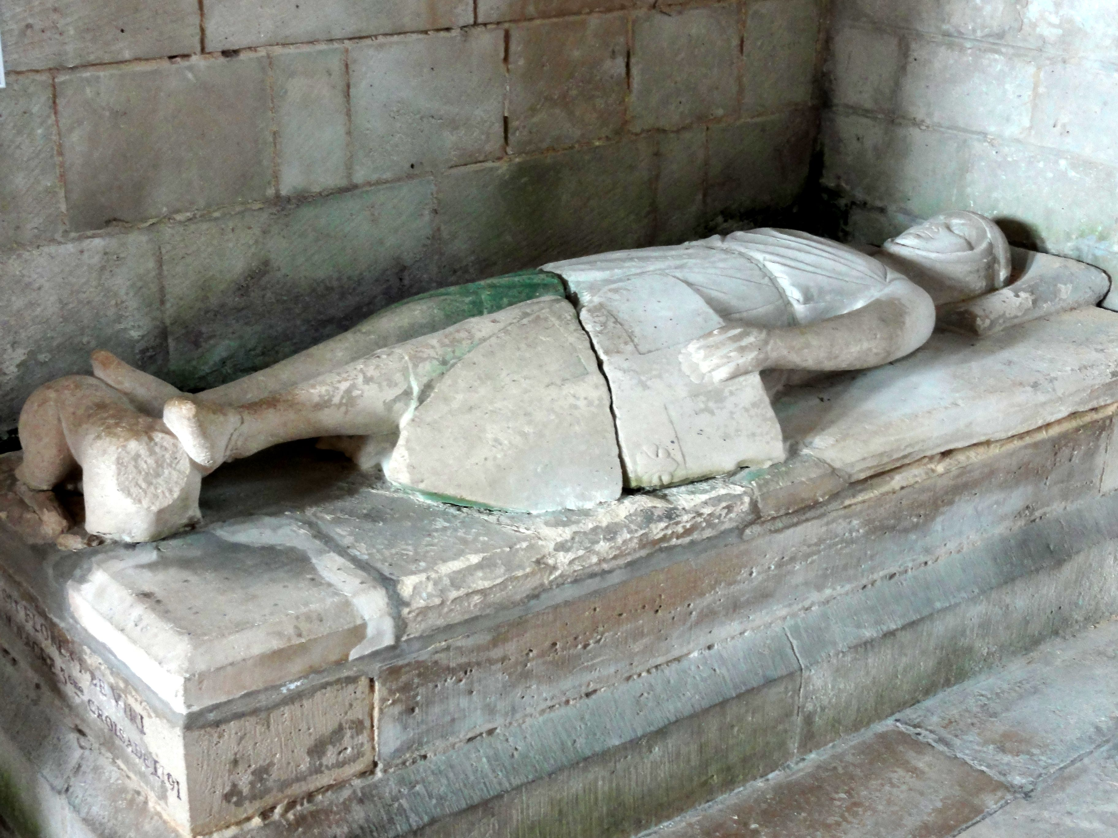 Gisant de Florent de Hangest, chevalier.